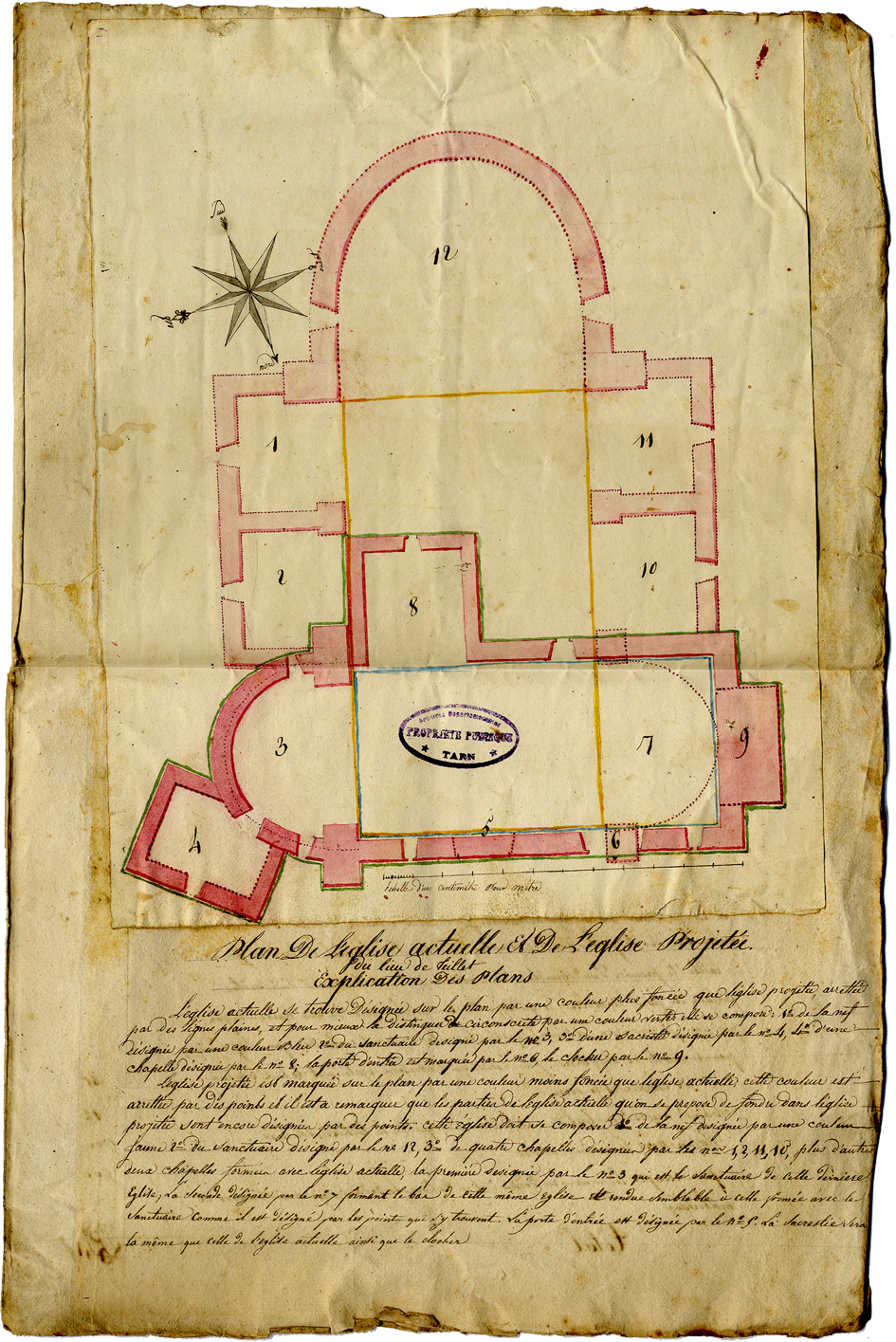 Plan de l'ancienne église Saint-Amans de Teillet (81)